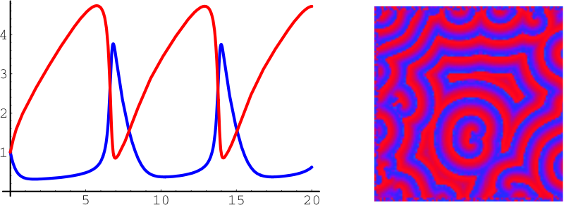 Brüsselator *Fotograf oder Zeichner: --Jkrieger